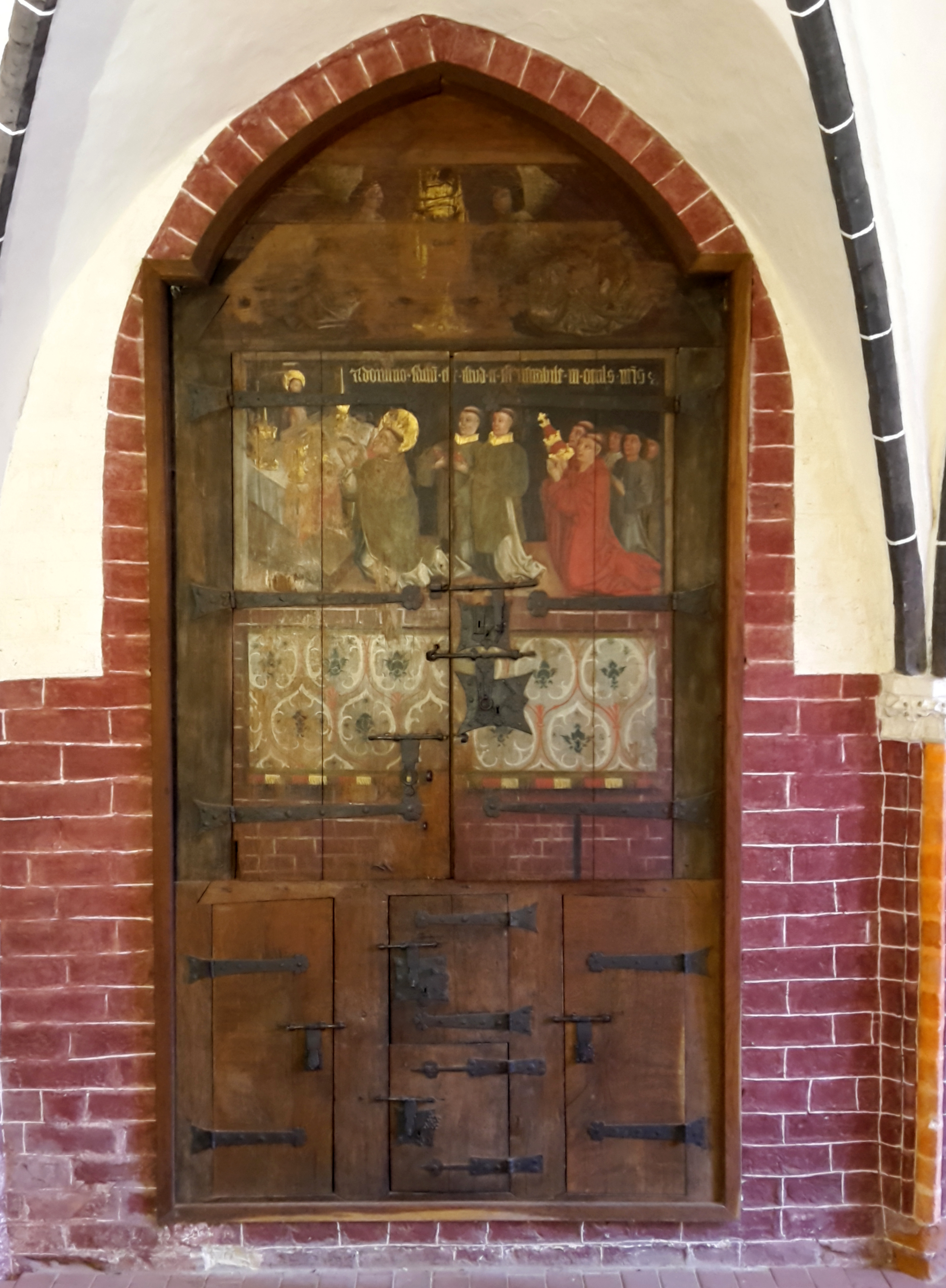 Im geschlossen Zustand. Zwei Engel halten die Monstranz mit dem Heiligen Blut. Darunter eine Darstellung der Gregorsmesse mit der Vision von Papst Gregor I. (590-604) beim Feiern der Messe.